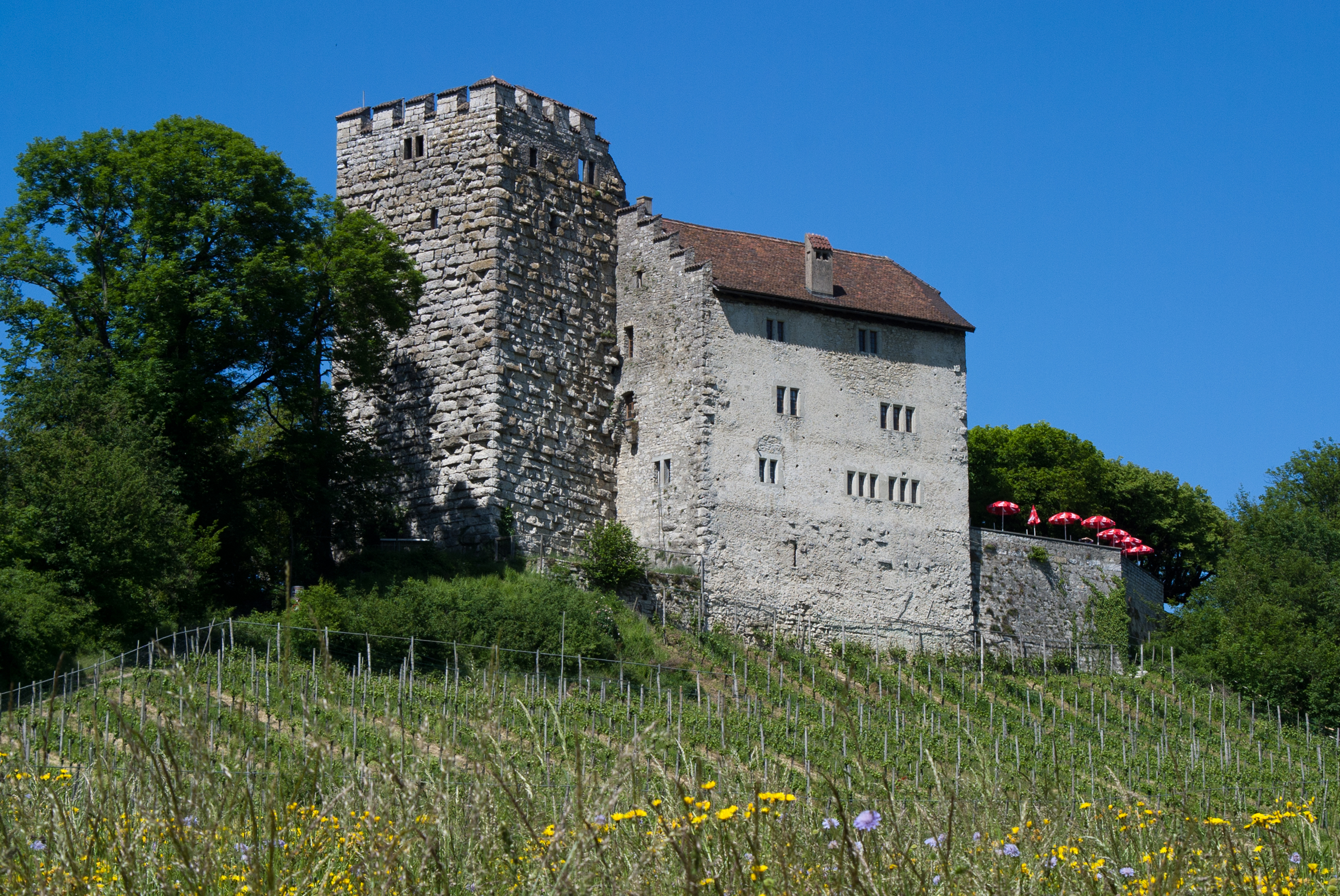 Schloss Habsburg